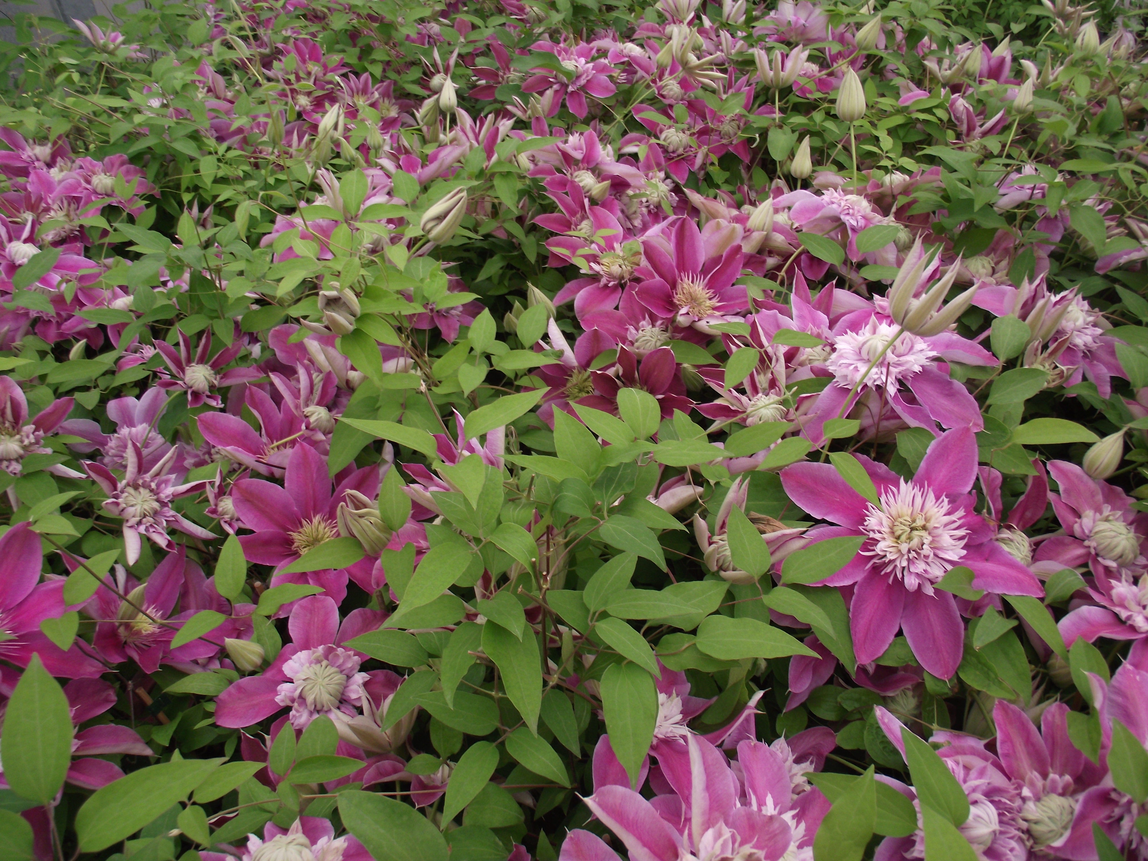 clematis patens josephine evijohill 3